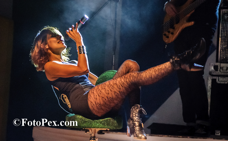 Expoferia Huajuapan 2012